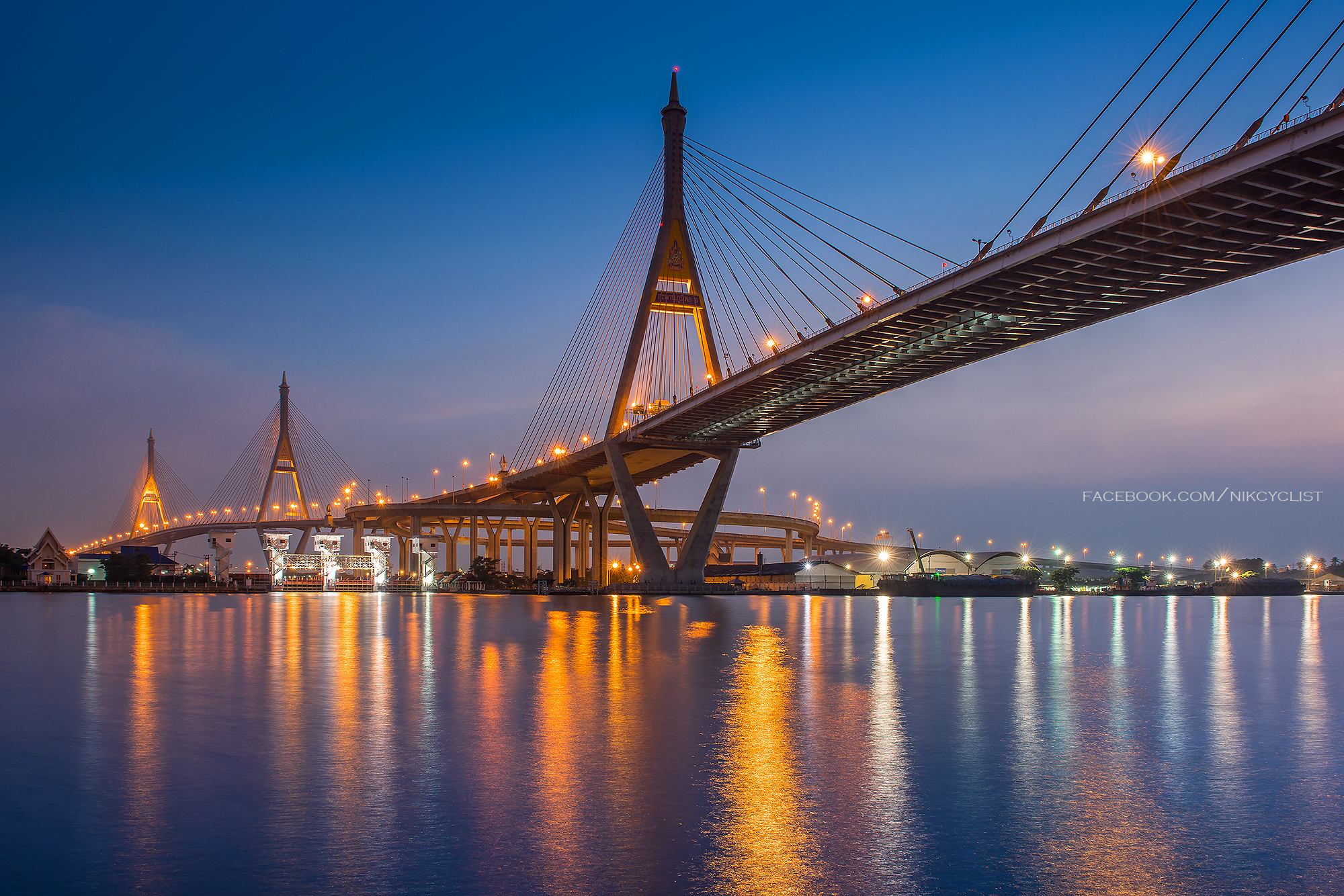 Bhumibol Bridge in Bangkok & Samut Prakan, Thailand